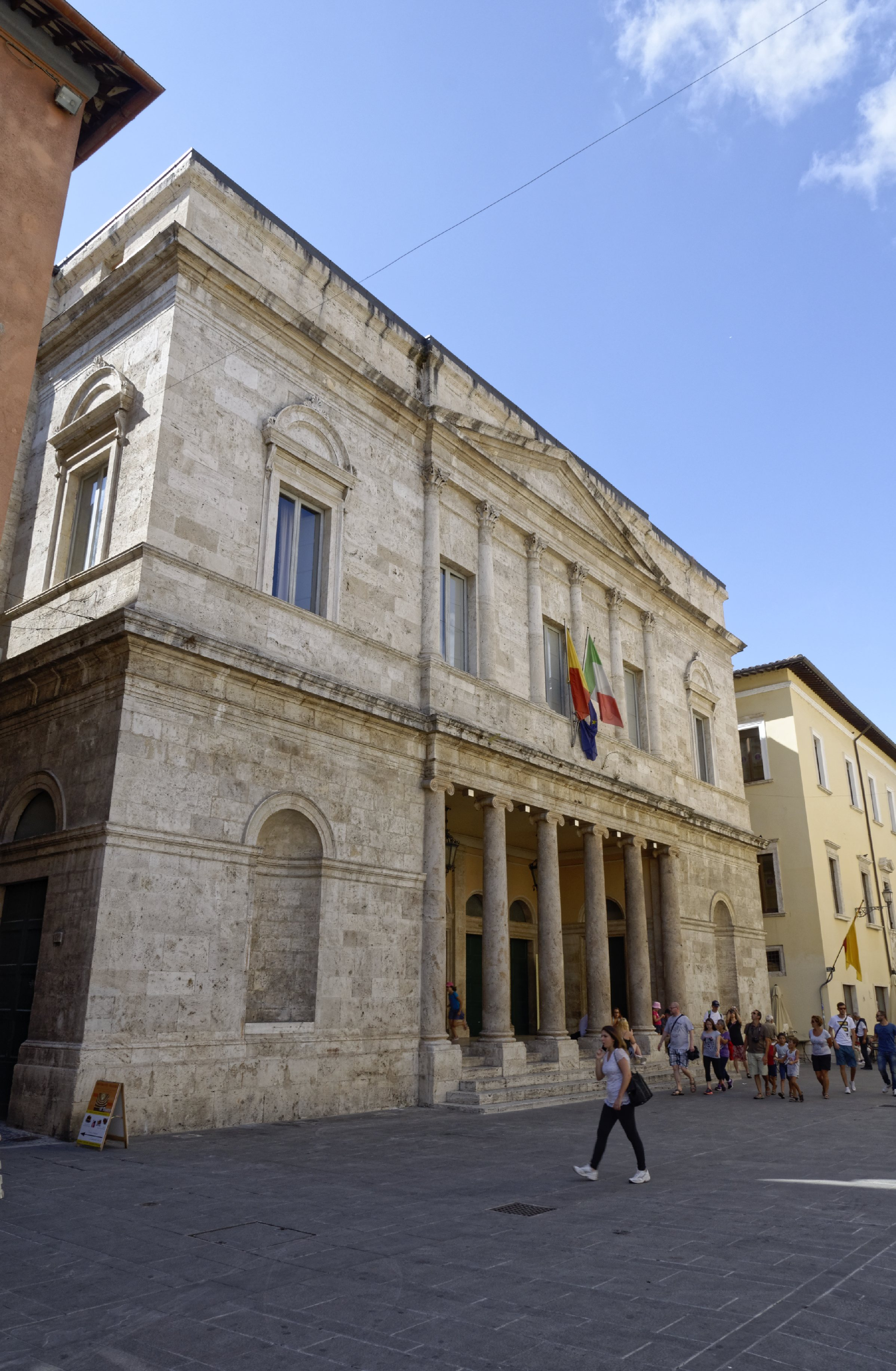 Ascoli Piceno 2015 Dieses Foto entstand in Zusammenarbeit mit Stadtbesichtigungen.de Die Seiten Stadtbesichtigungen.de, der dazugehörige Reise Blog sowie die Facebookseite: Stadtbesichtigungen Rom dürfen dieses Bild für Ihre Veröffentlichungen ohne den Hinweis auf Wikipedia, Commons bzw der Lizenz verwenden. Die Verantwortlichen habe von mir (Ra Boe) die Originaldaten zur freien Verfügung übermittelt bekommen.